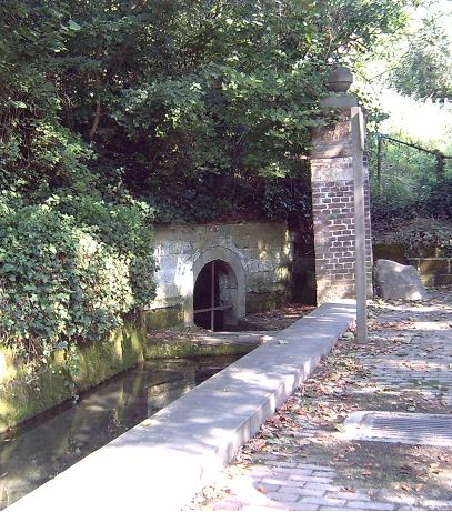 Limburgs: Brigidabrón in de Wesj bie Norbik, Noorbeek, (Nederlands Limburg)